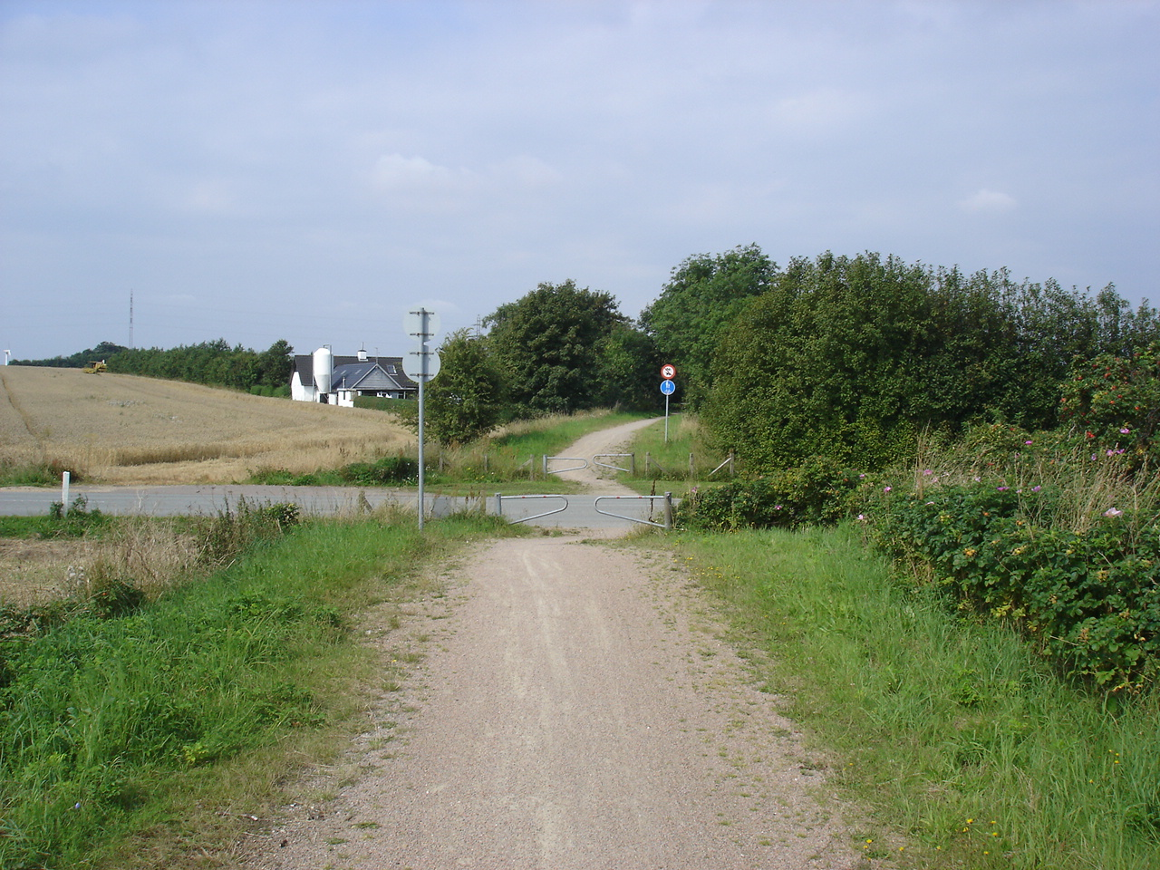 Salling Natursti krydser Tønderingvej - her lå Tinghøj trinbræt